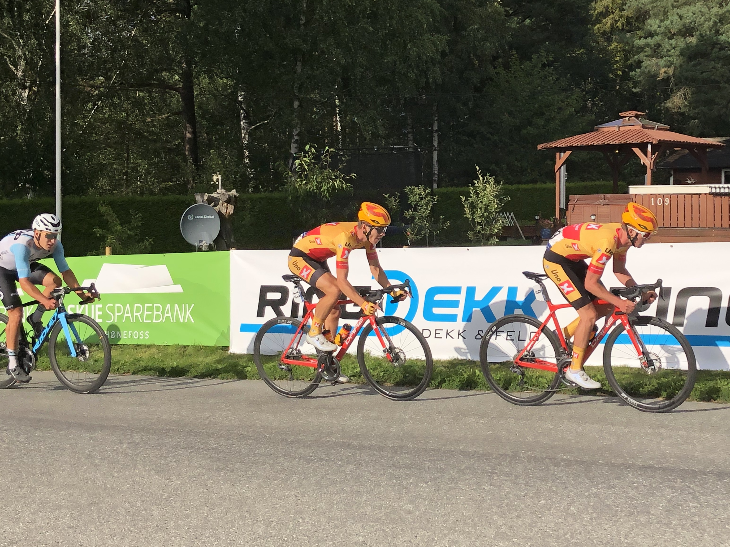 NM landevei fellesstart 2020 Røyse - 9 Idar Andersen - 13 Jonas Iversby Hvideberg